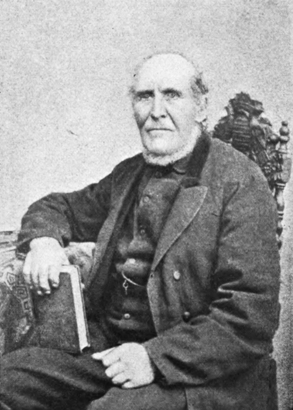 Hornjoserbsce: Pětr Młóńk (1805–1887); serbski ludowy basnik a narodny prócowar.